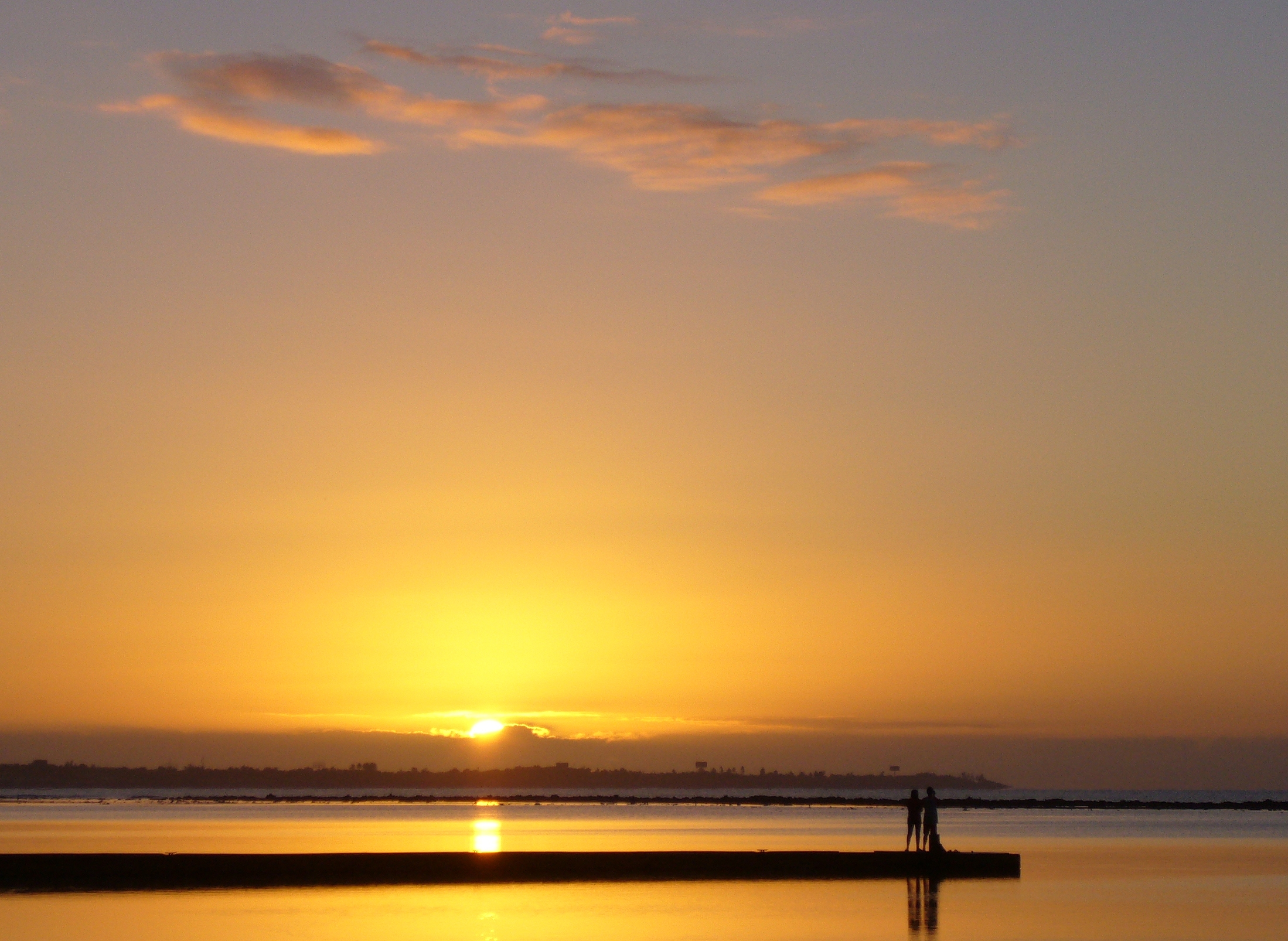 Die Bucht von Boca Chica ist durch ein vorgelagertes Riff geschützt.